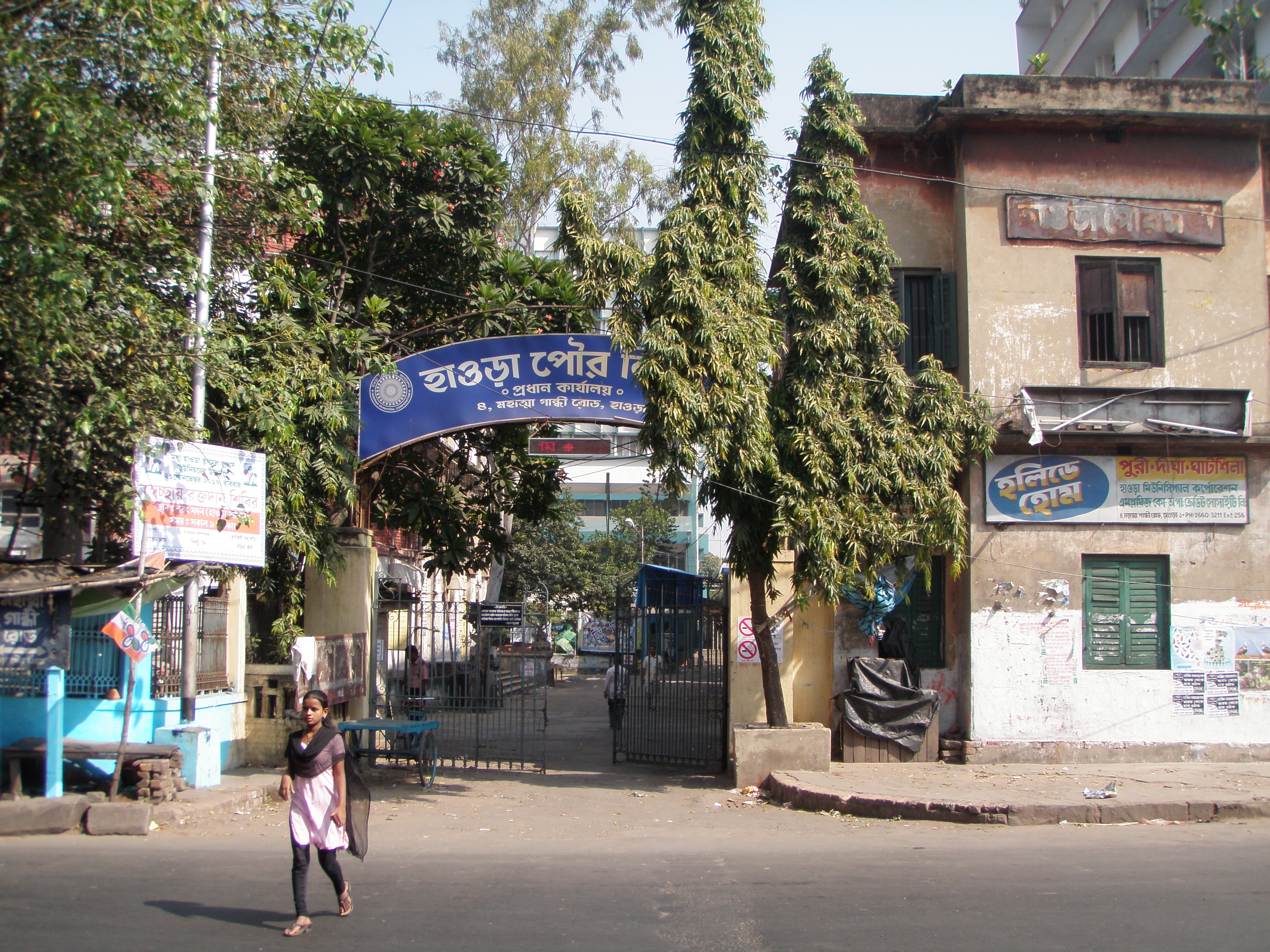 Howrah district, West Bengal